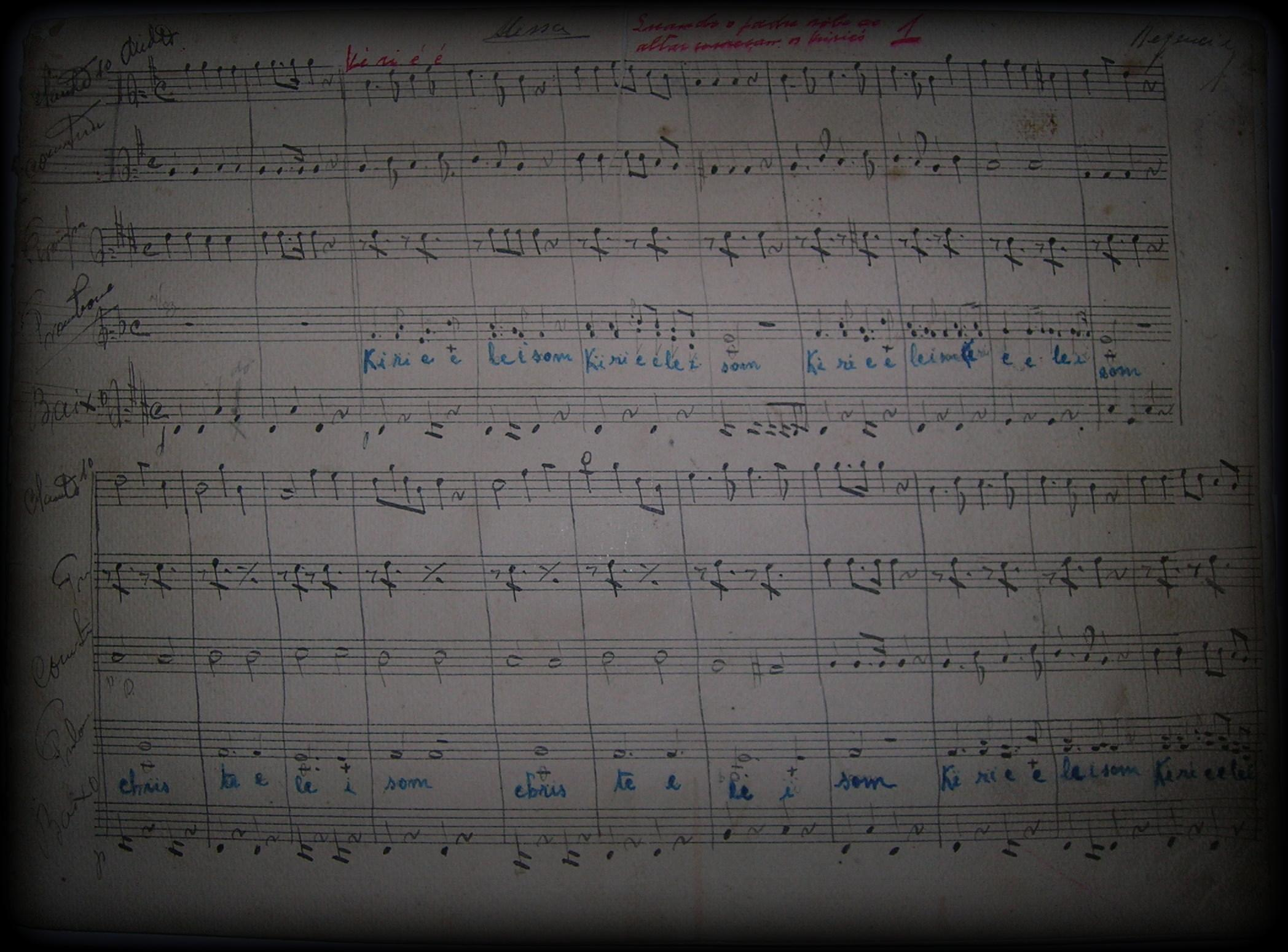 Partitura manuscrita existente da Missa (Kyrie, Gloria, Credo, Sanctus e Benedictus e Agnus Dei) e Tantum Ergo para 2 vozes solistas ou em coro e instrumentos de sopro.